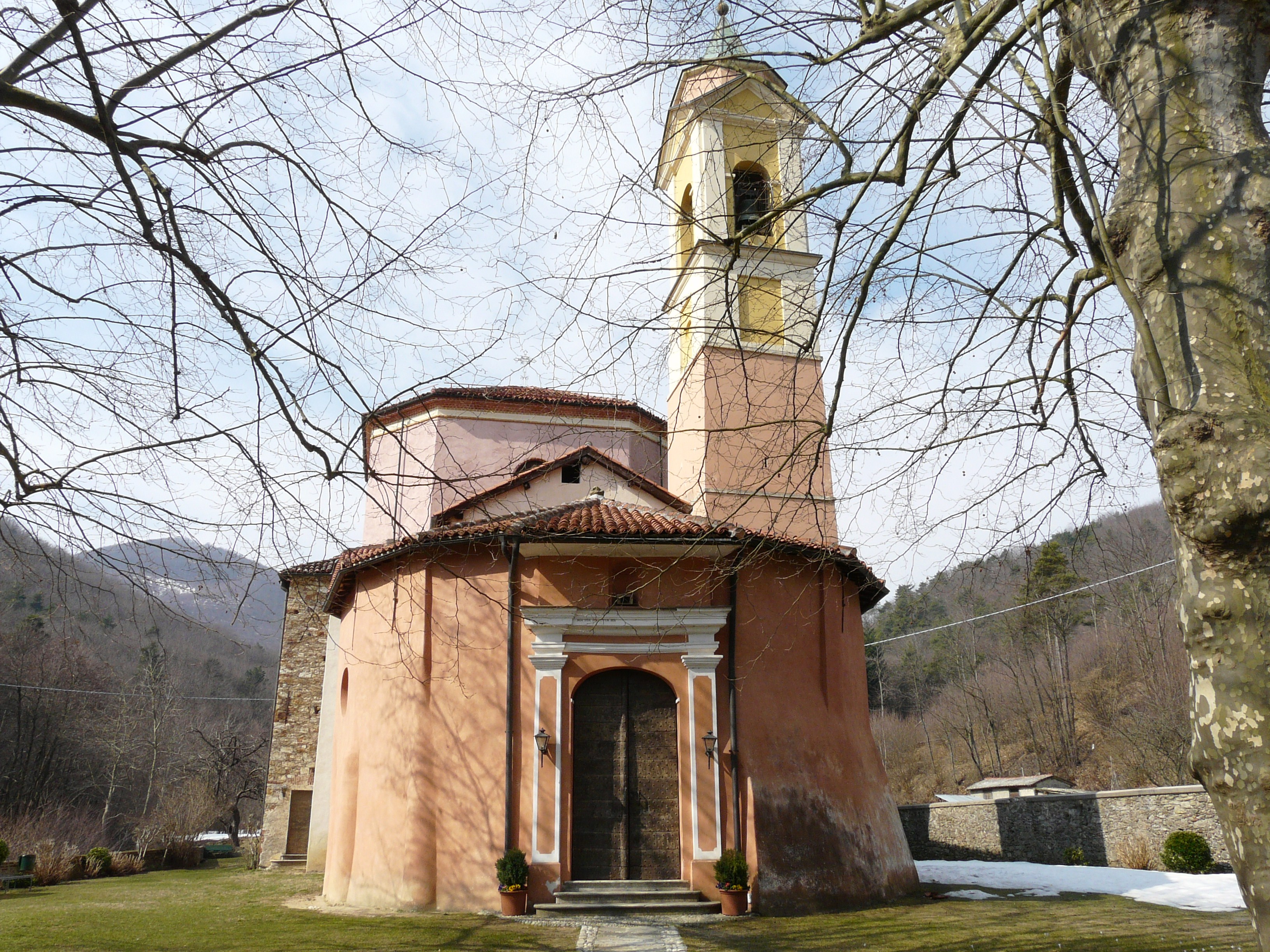 Santuario di Nostra Signora della Misericordia, Mallare, Liguria, Italia